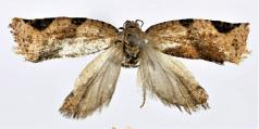 Isodemis quadrata FEMALE